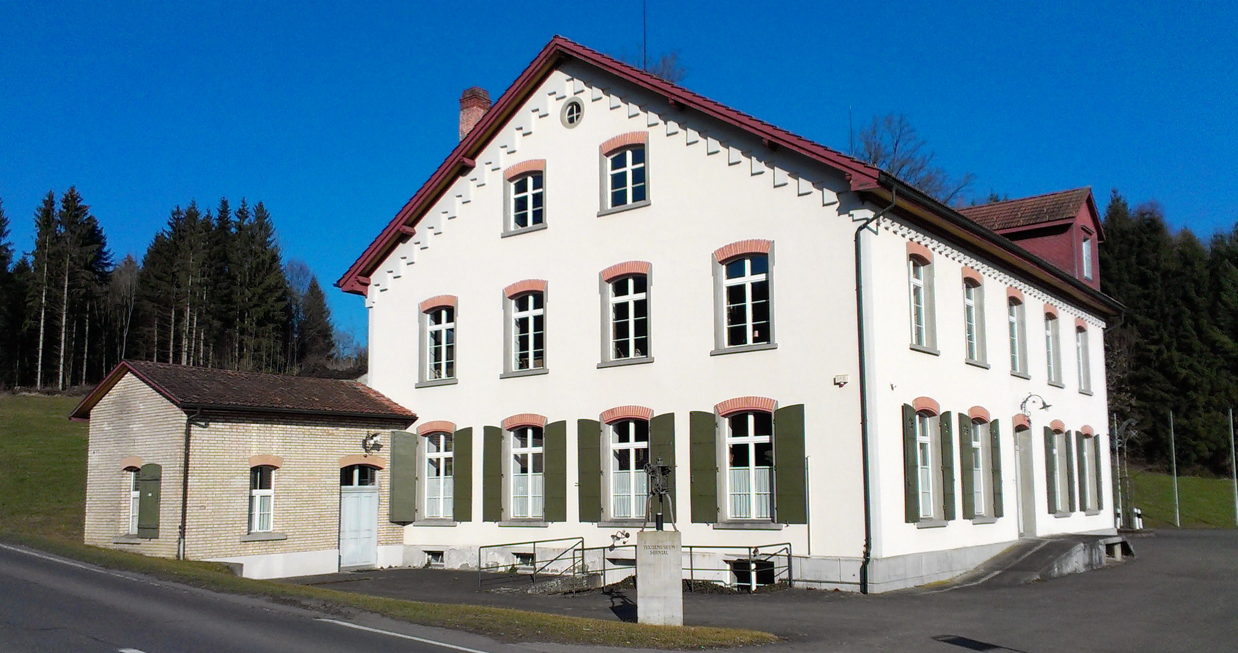 Textilmuseum Sorntal